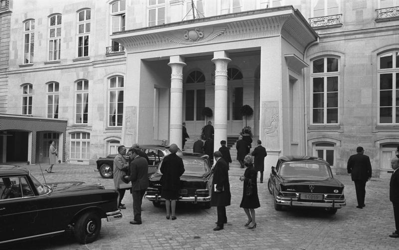 Einweihung der deutschen Botschaftsresidenz, Palais Beauharnais, in Paris: 4-19 Frau Lübke besucht die Sainte-Chapelle. 21-35 Geschenkaustausch zwischen Bundespräsident Lübke und Prinz Napoleon.